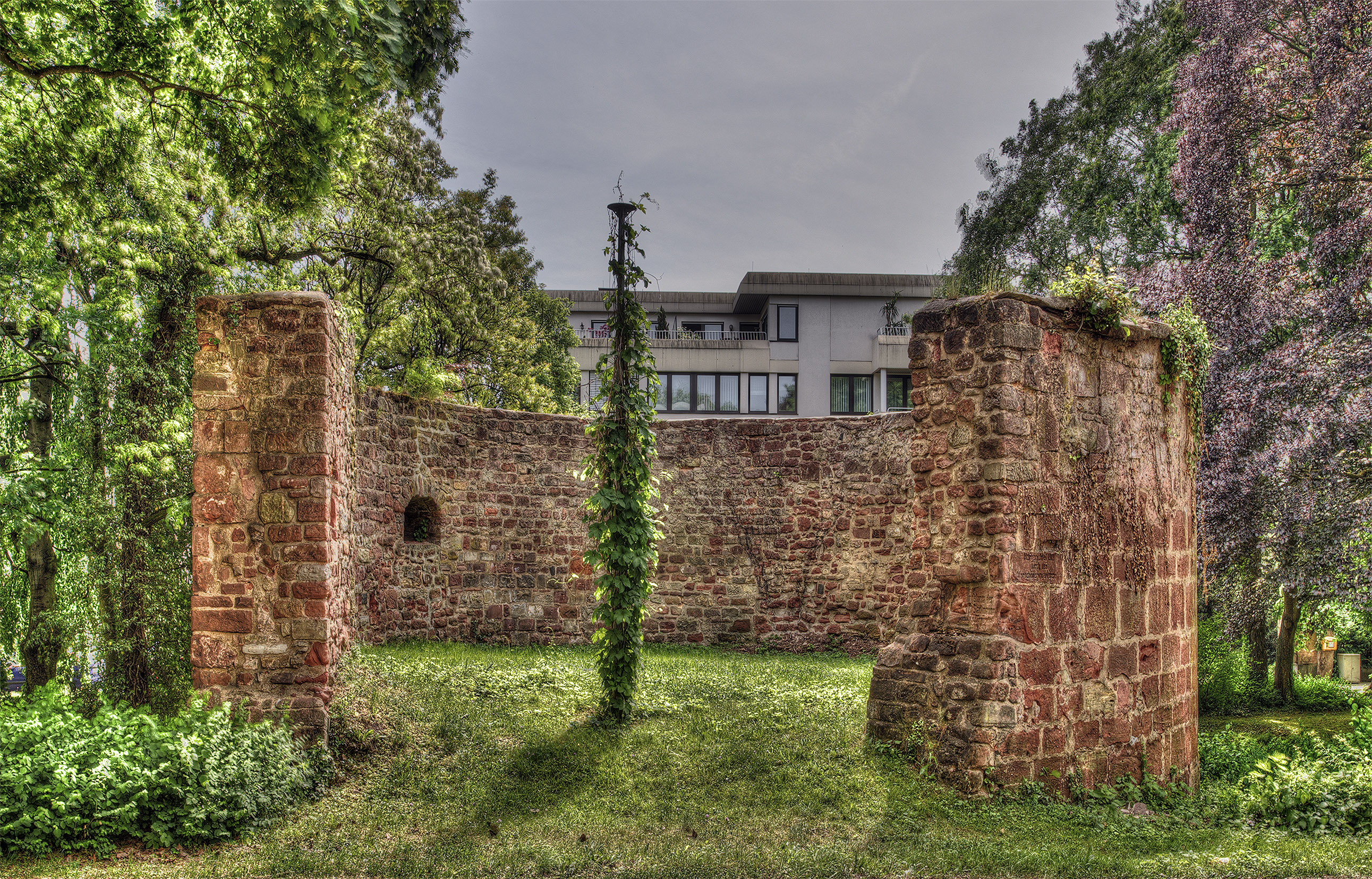 Trier, Bastion Südallee, erbaut um 1540. Kaiserstraße, gegenüber Nr. 24, im Alleenring gelegen.